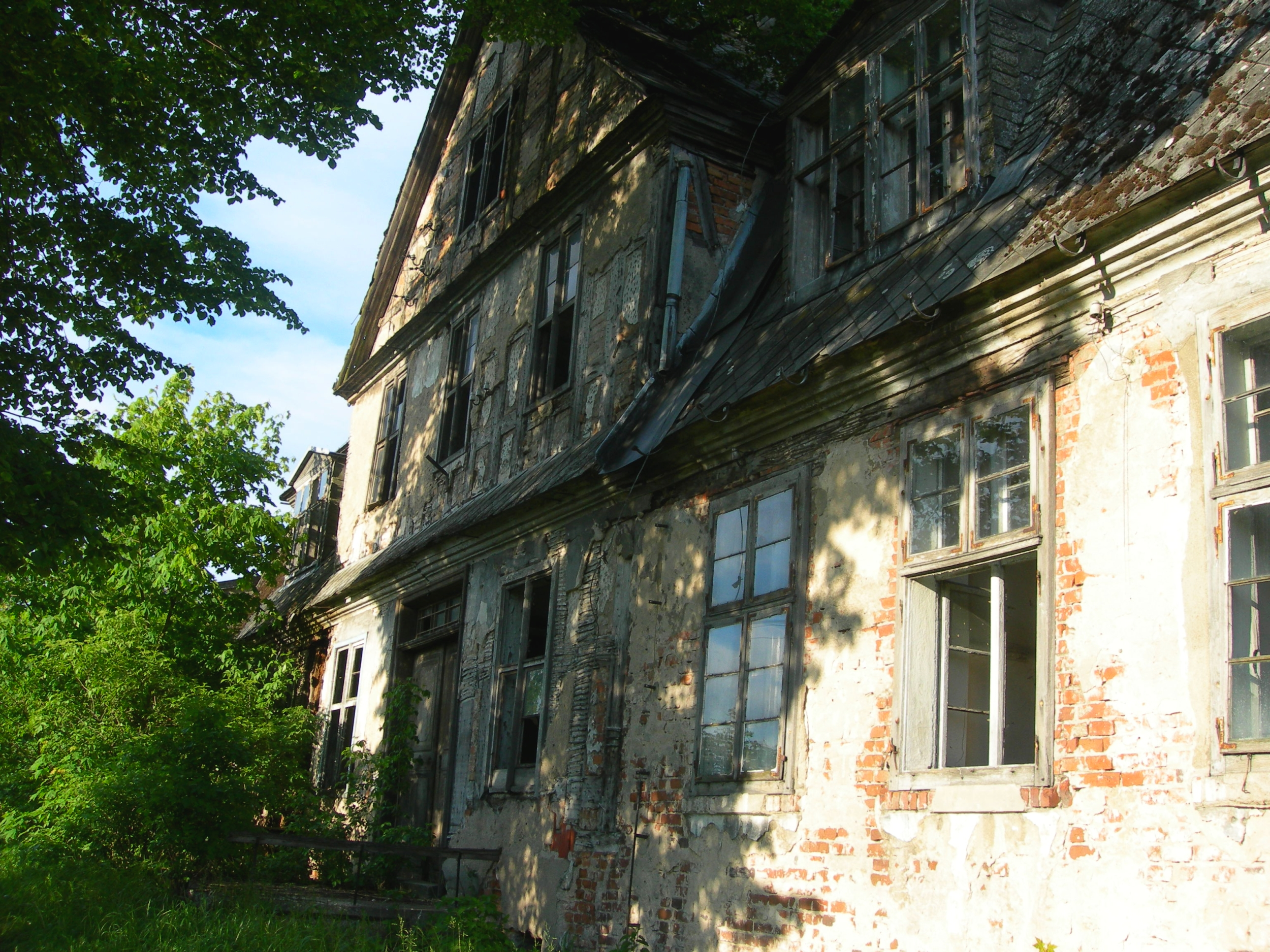 Dworek w Łopuchowie. Zdjęcie wykonano 30 maja 2006. Autor zdjęcia : Jakub Sobek